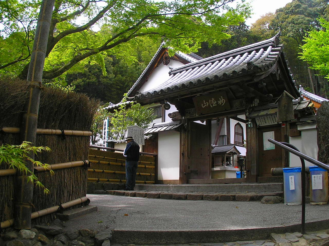 妙徳山 華厳寺 (京都市)鈴虫寺 石段